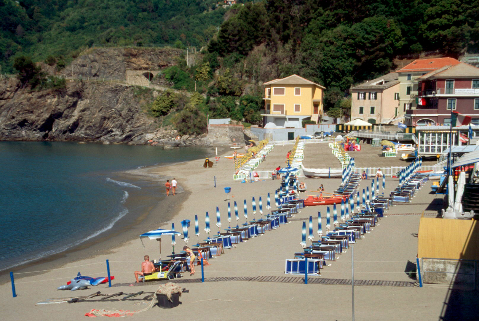 Moneglia 2004